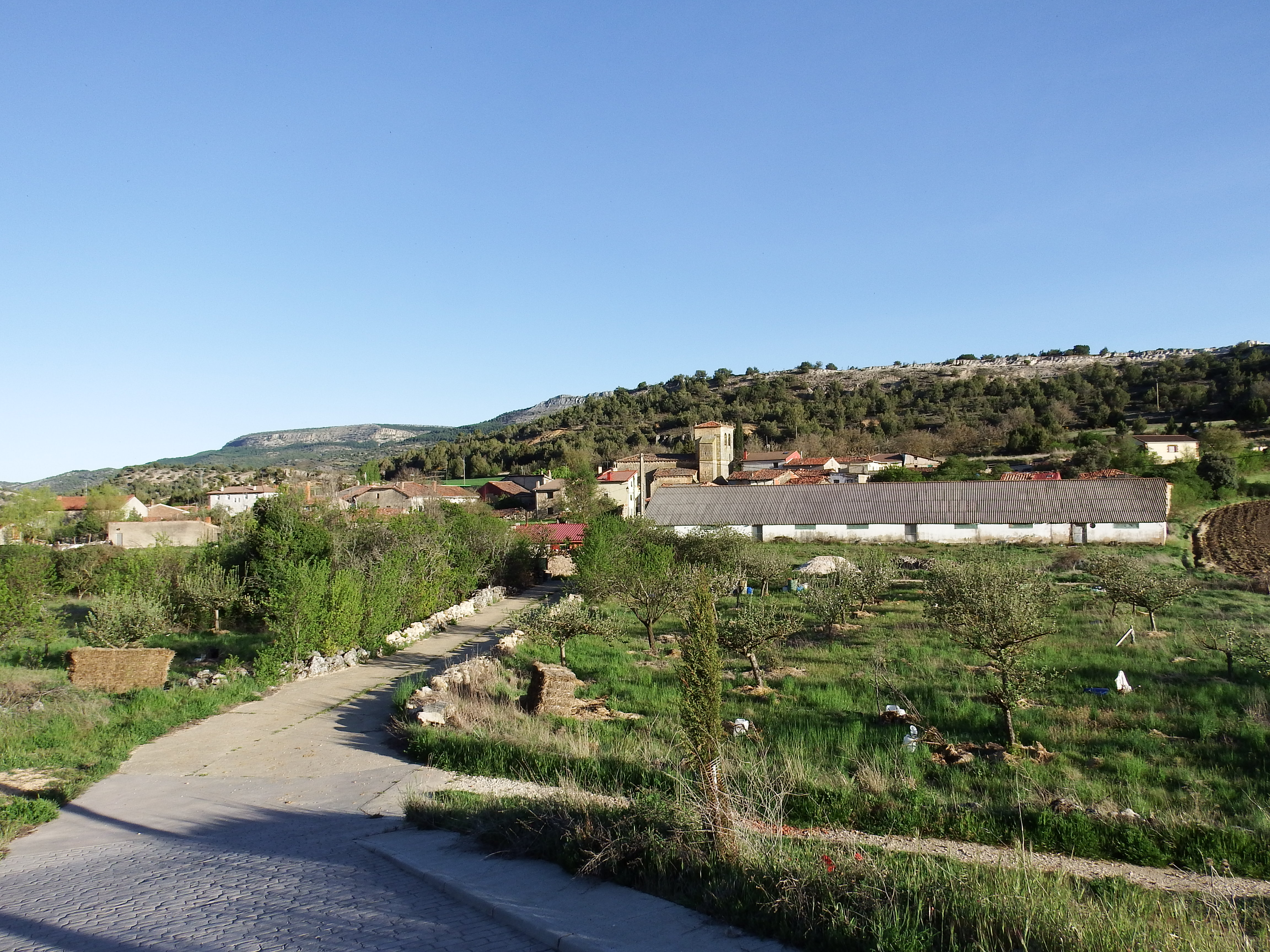 Quintanilla del Coco